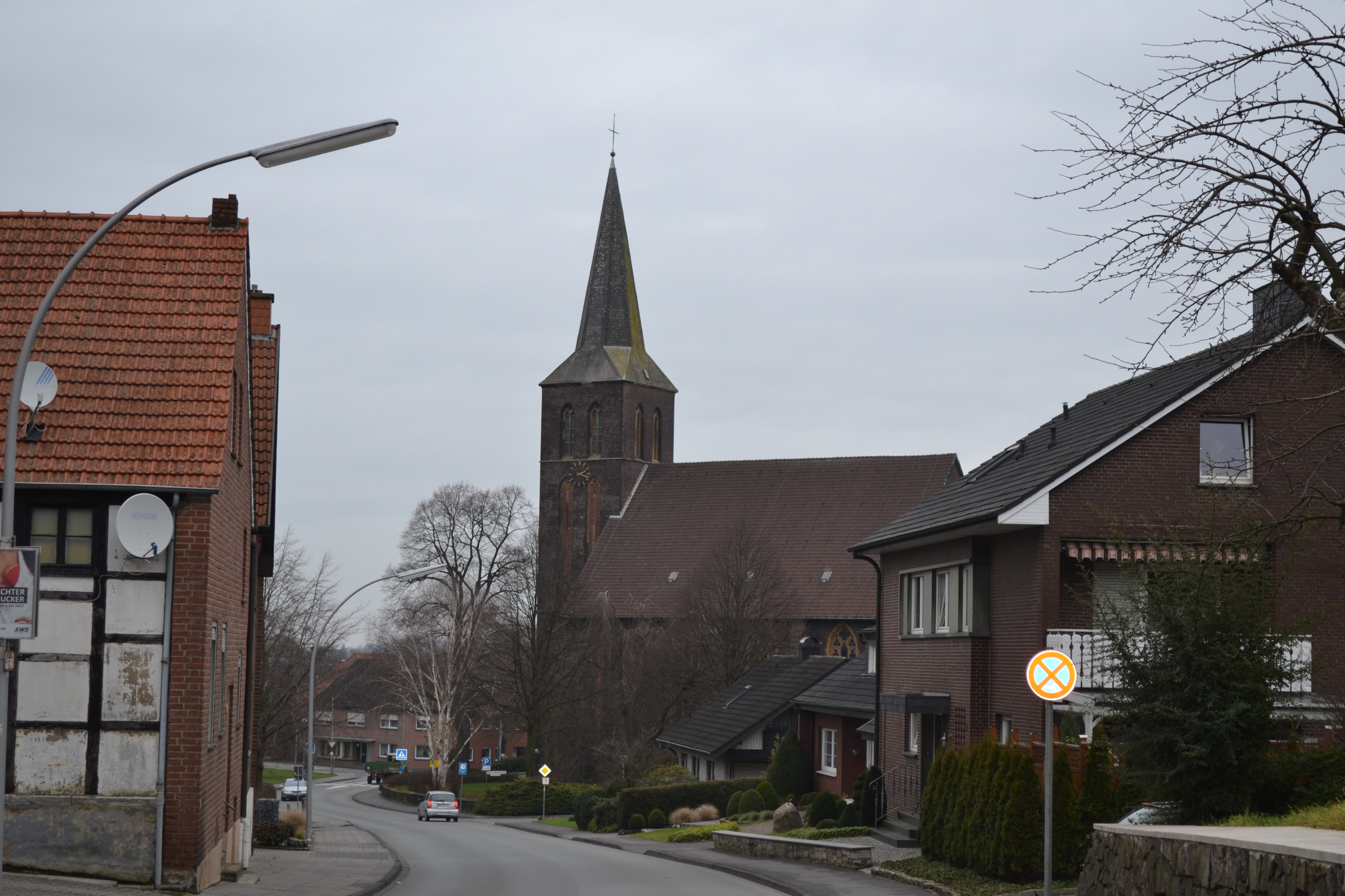 Ostenfelde, Kath. Kirche St. Magaretha